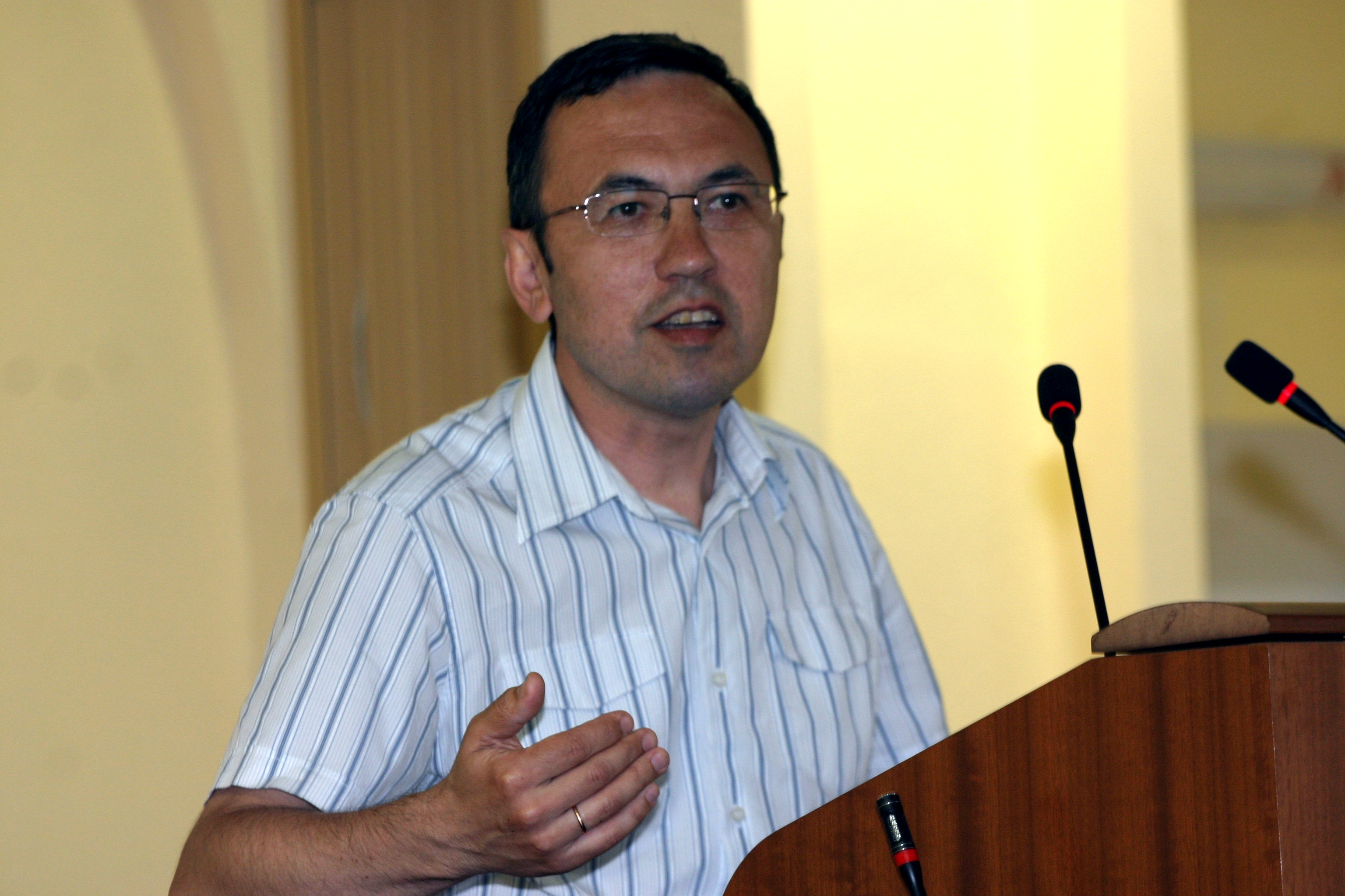 А.У. Игамбердиев читает лекцию по фотосинтезу в Воронежском университете